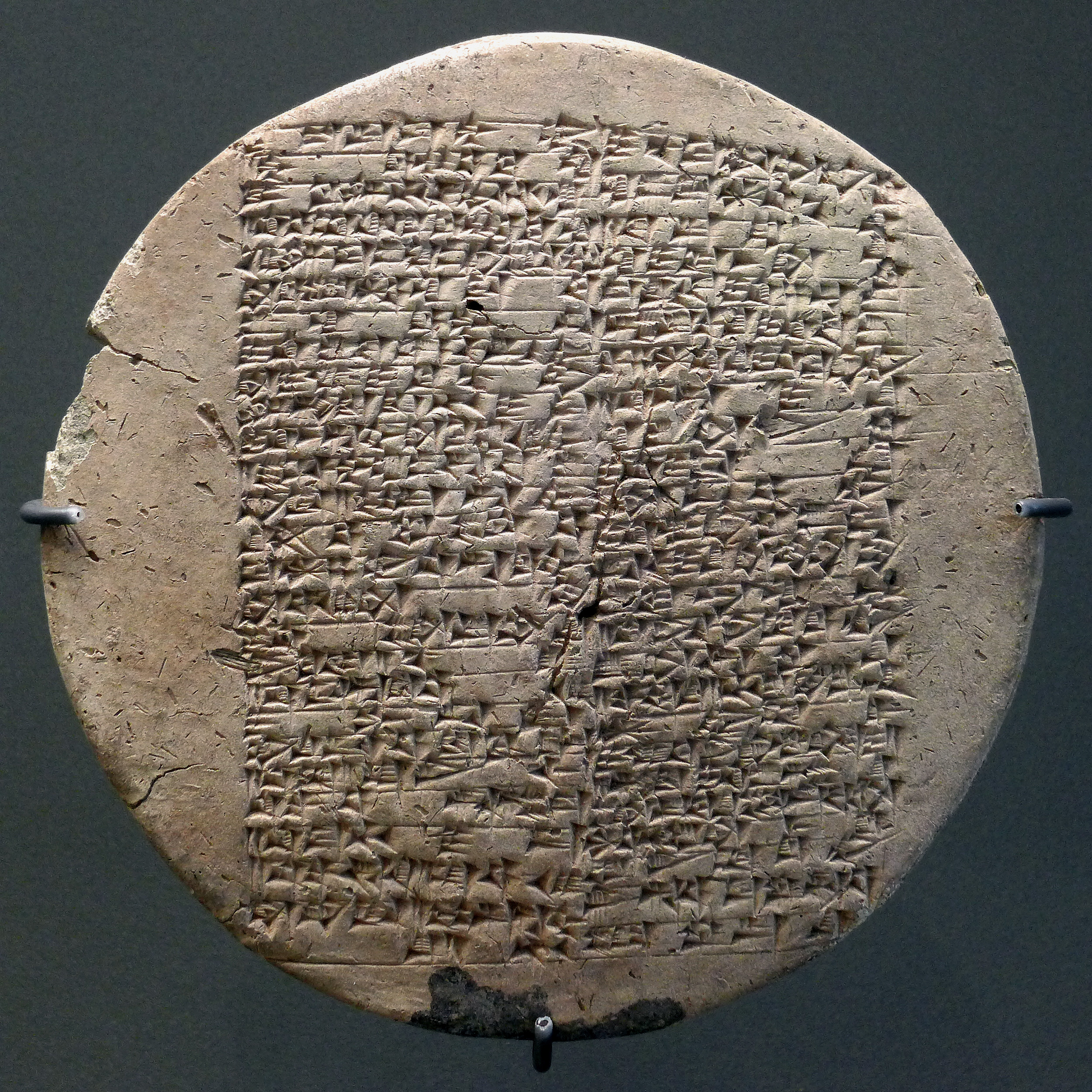 Tête d’un clou de fondation dédié par le prince Kudur-Mabuk, « père du pays amorite », fondateur d’une nouvelle dynastie à Larsa.